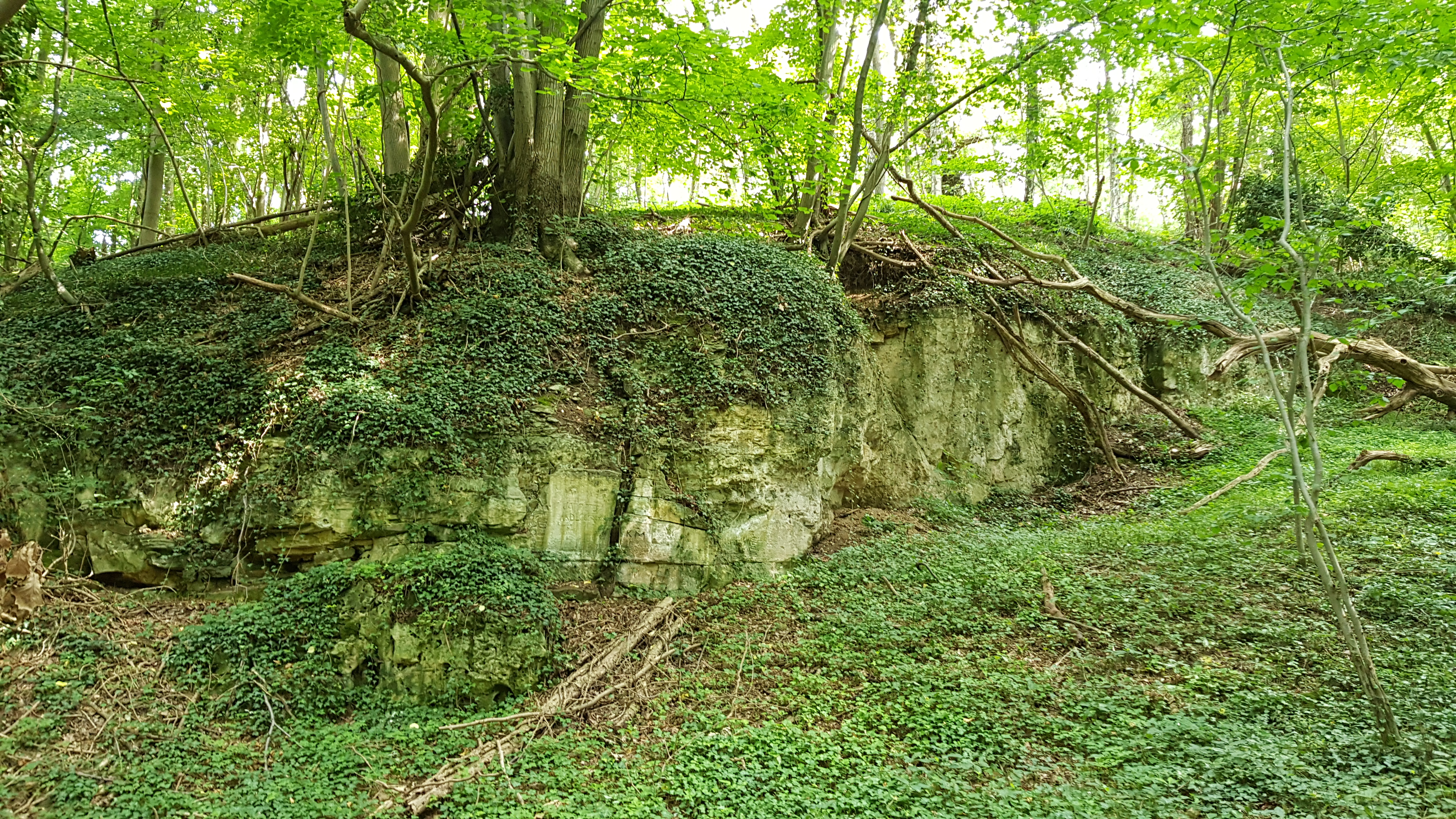 Neven Lebensboschgroeve in het Savelsbos, Rijckholt, Nederland